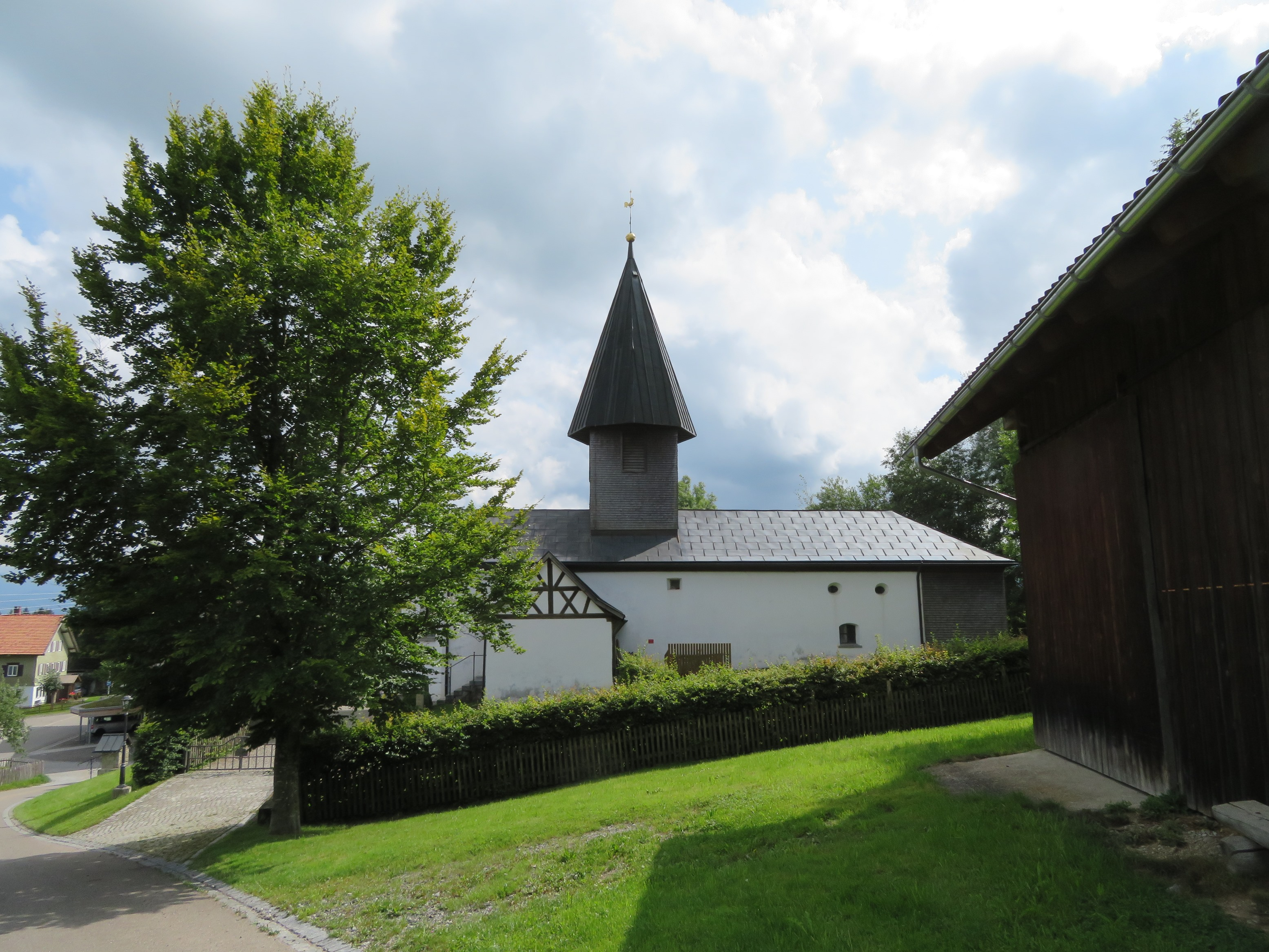 St. Oswald in Knottenried (Diepolz)